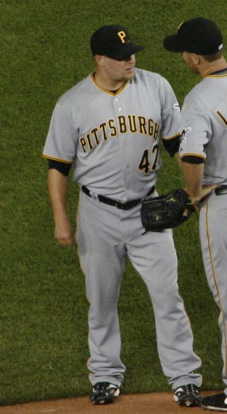 Evan Meek